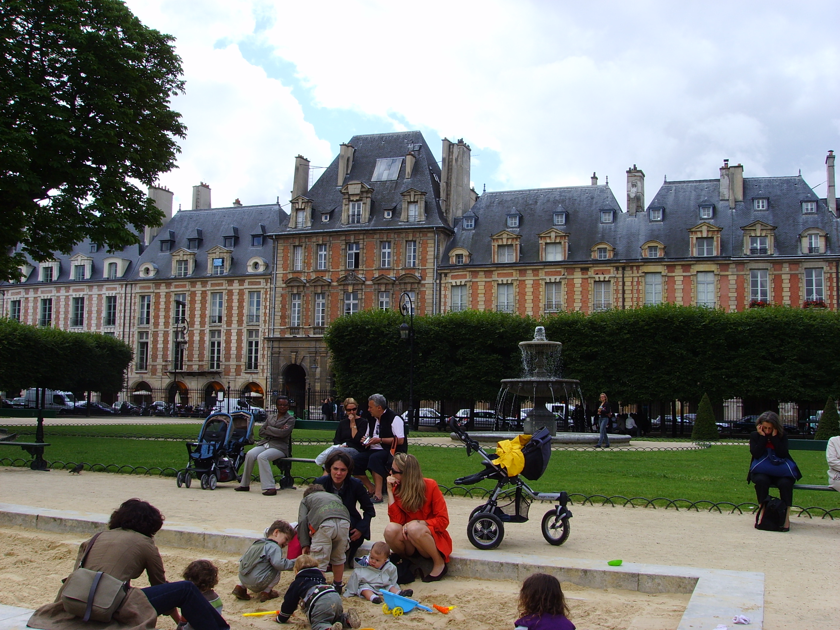 Place des Vosges, Paris